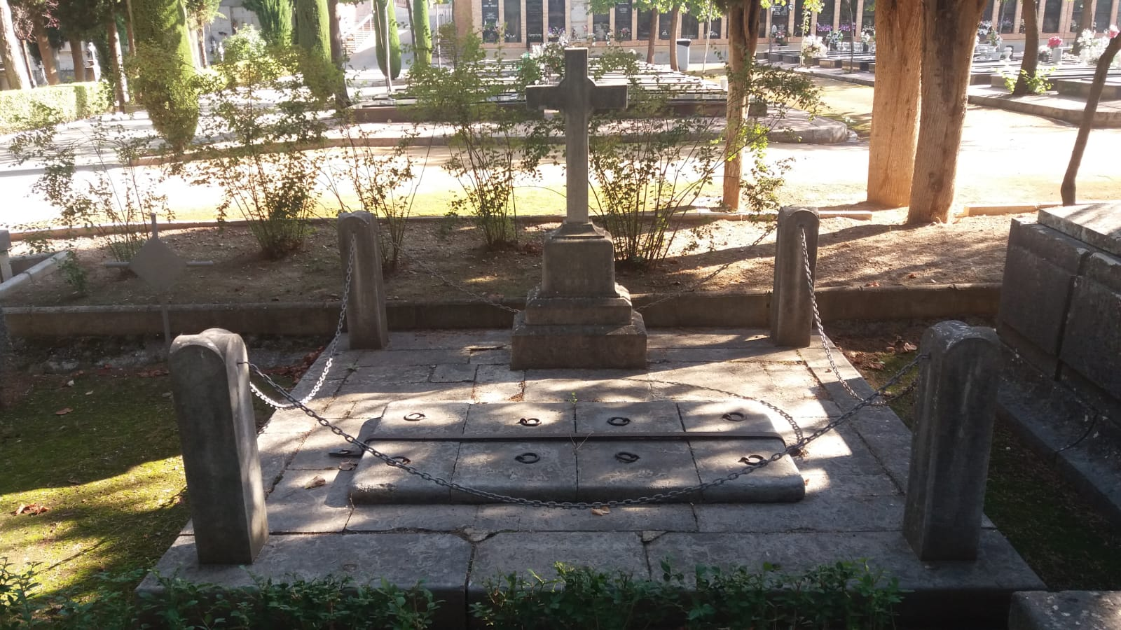 Tumba de Manuel M.ª Fernández de Prada y Pareja, Marqués de las Torres de Orán